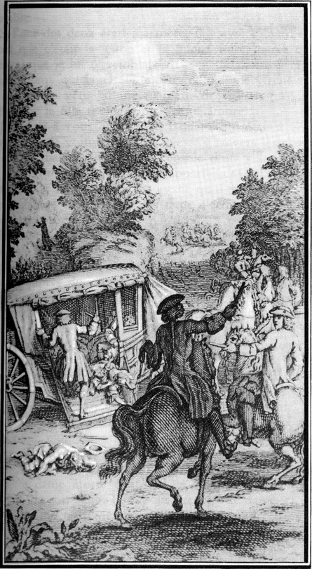 La Vie de Marianne by Pierre de Marivaux (1688-1763)